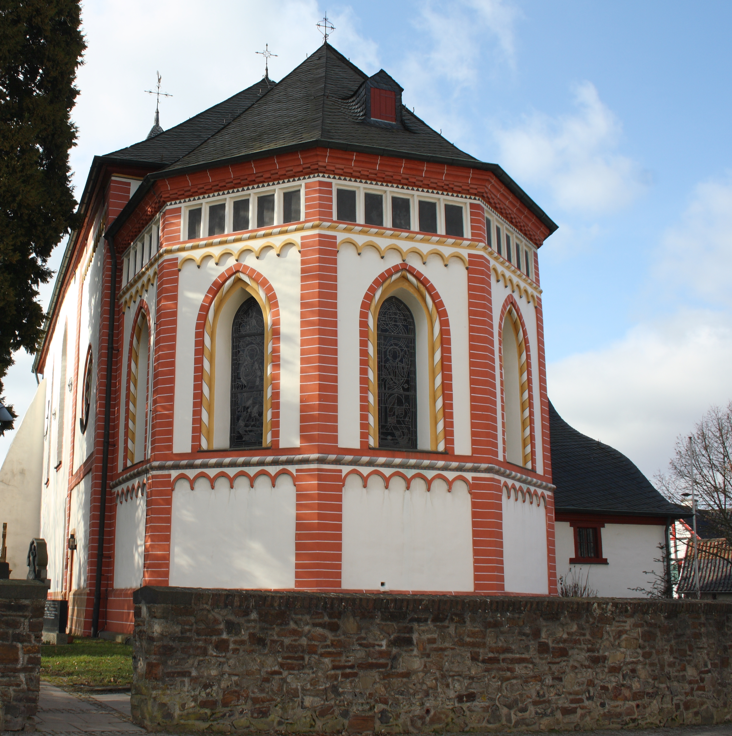 katholische Pfarrkirche St. Peter in Lüftelberg, Chor